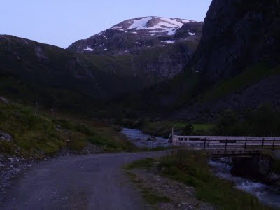 Botnafjellet over Sørsendalen sett frå Ytre Kandal